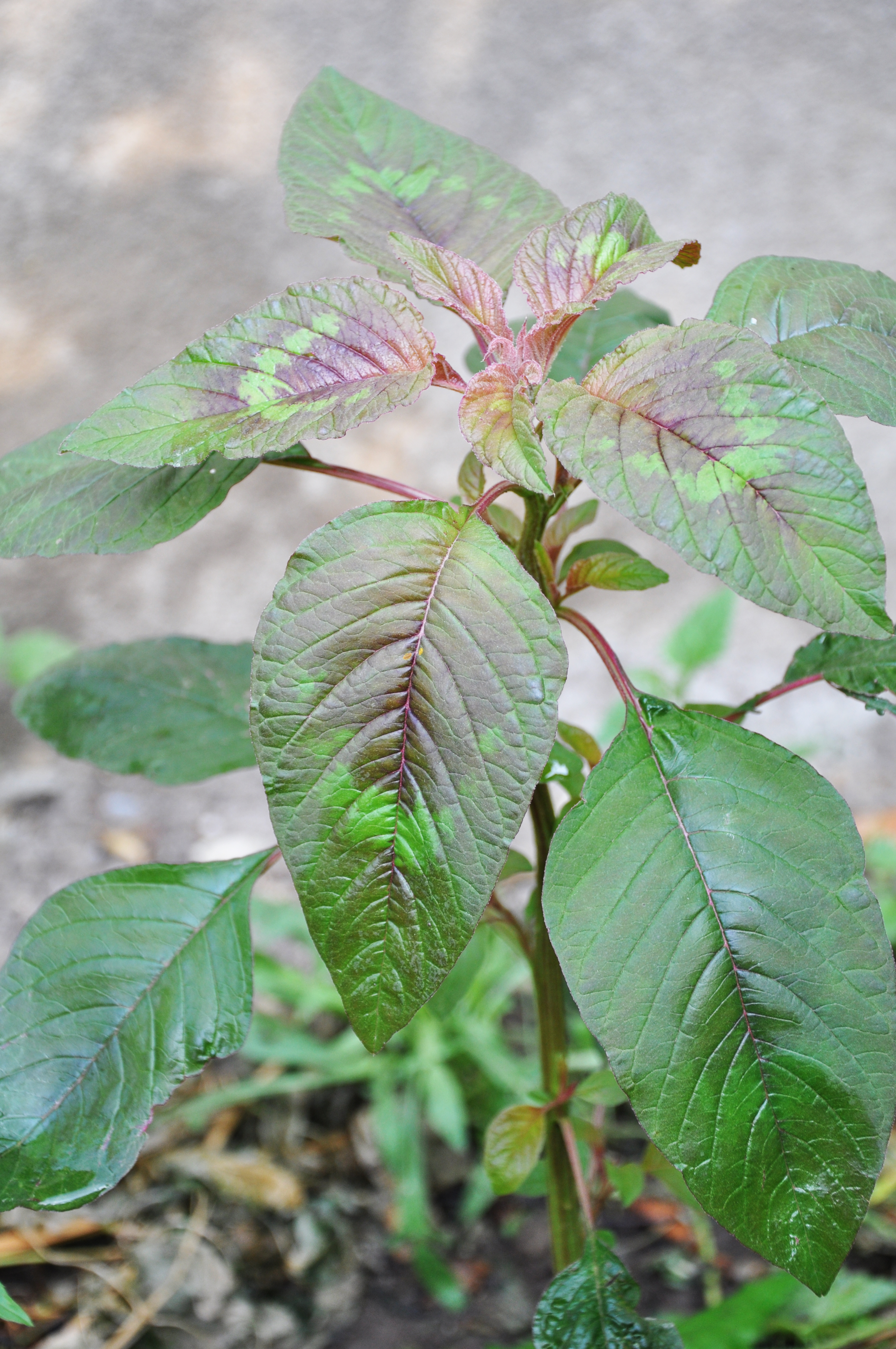 გადაღებულია მცხეთაში Taken in Mtskheta